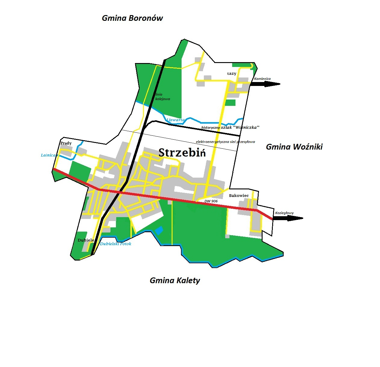 podział administracyjno-topograficzny Strzebiń i Gmina Woźniki